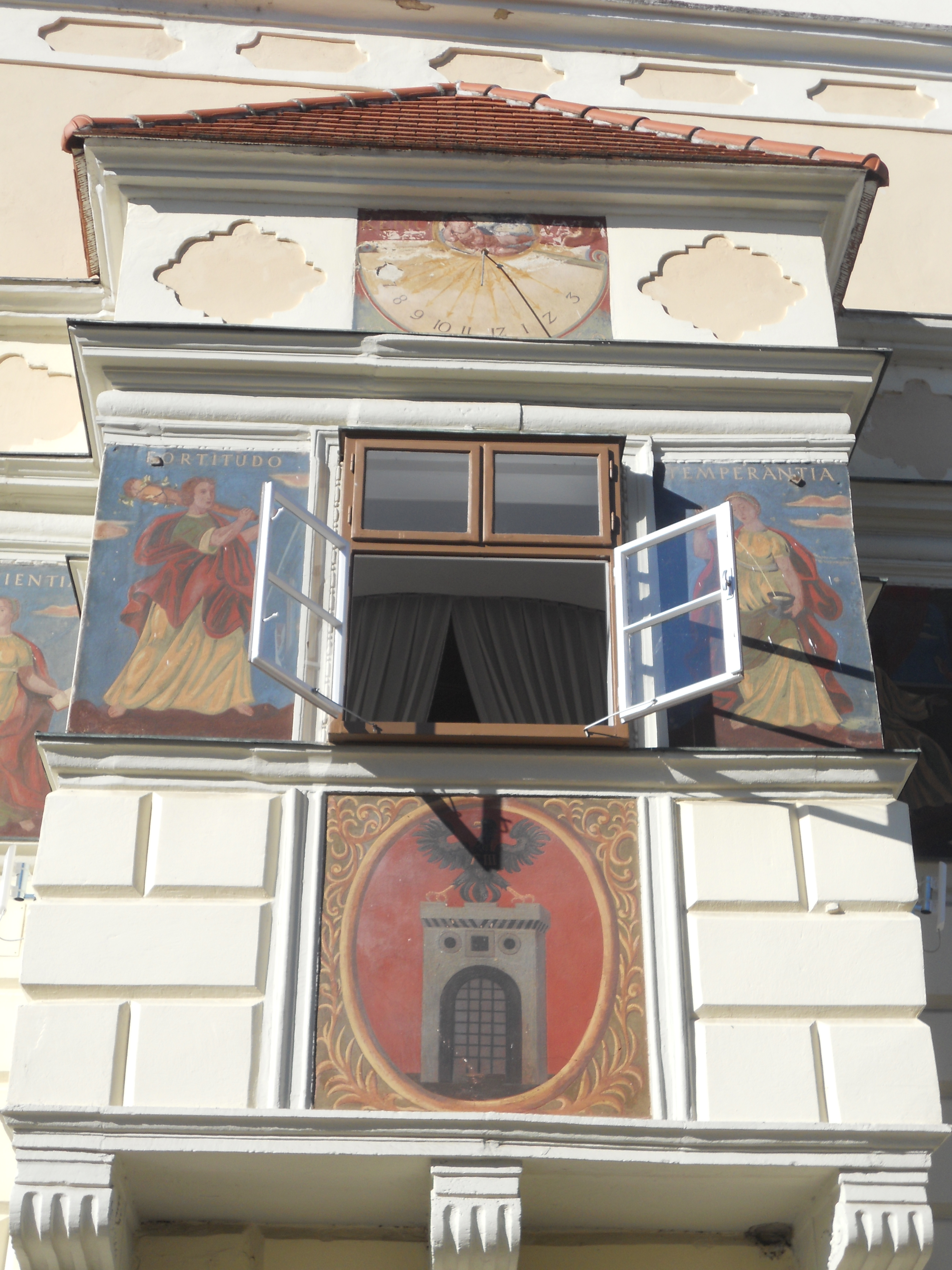 Rathaus/Gemeindeamt